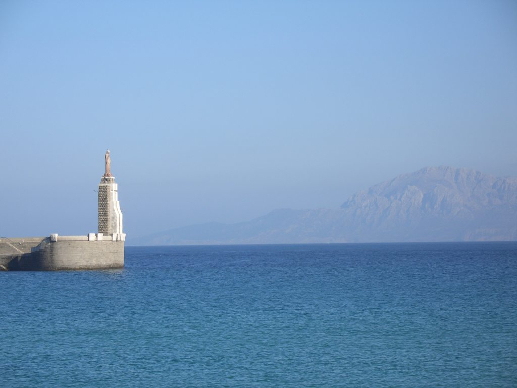 An der Straße von Gibraltar vor Tarifa (Spanien): der südlichste Ort Europas; am Horizont: die marokkanische Küste Afrikas